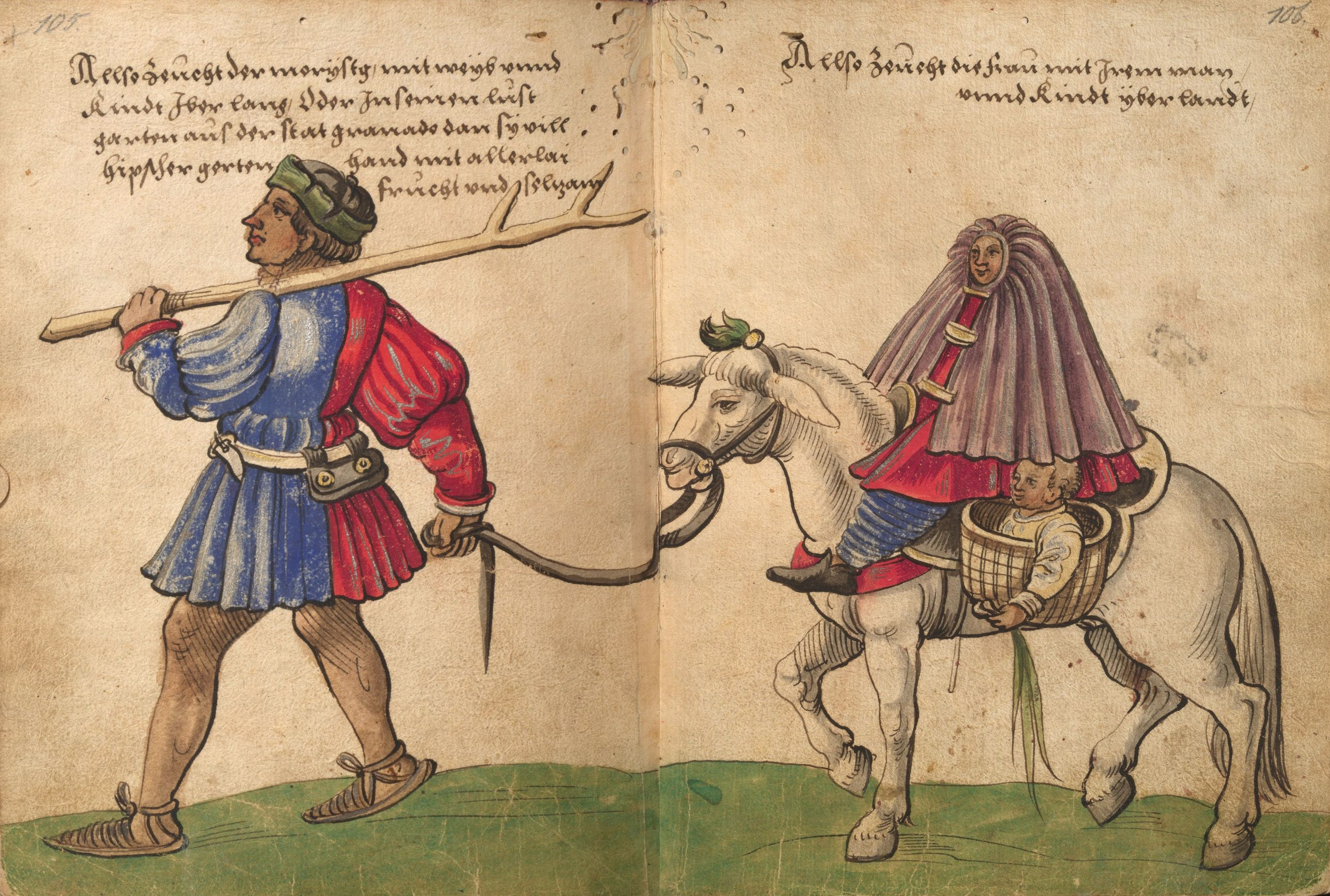 "Trachtenbuch" des Christoph Weiditz, Germanisches Nationalmuseum Nürnberg, Hs. 22474. Bl. 105–106 Wie die Morisken im Königreich Granada mit Weib und Kind über Land ziehen.